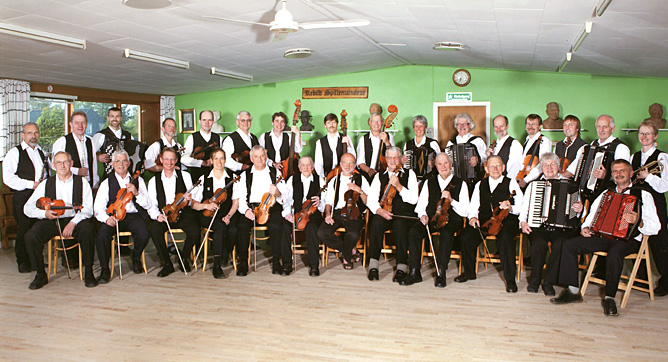 Rebild Spillemandslaug